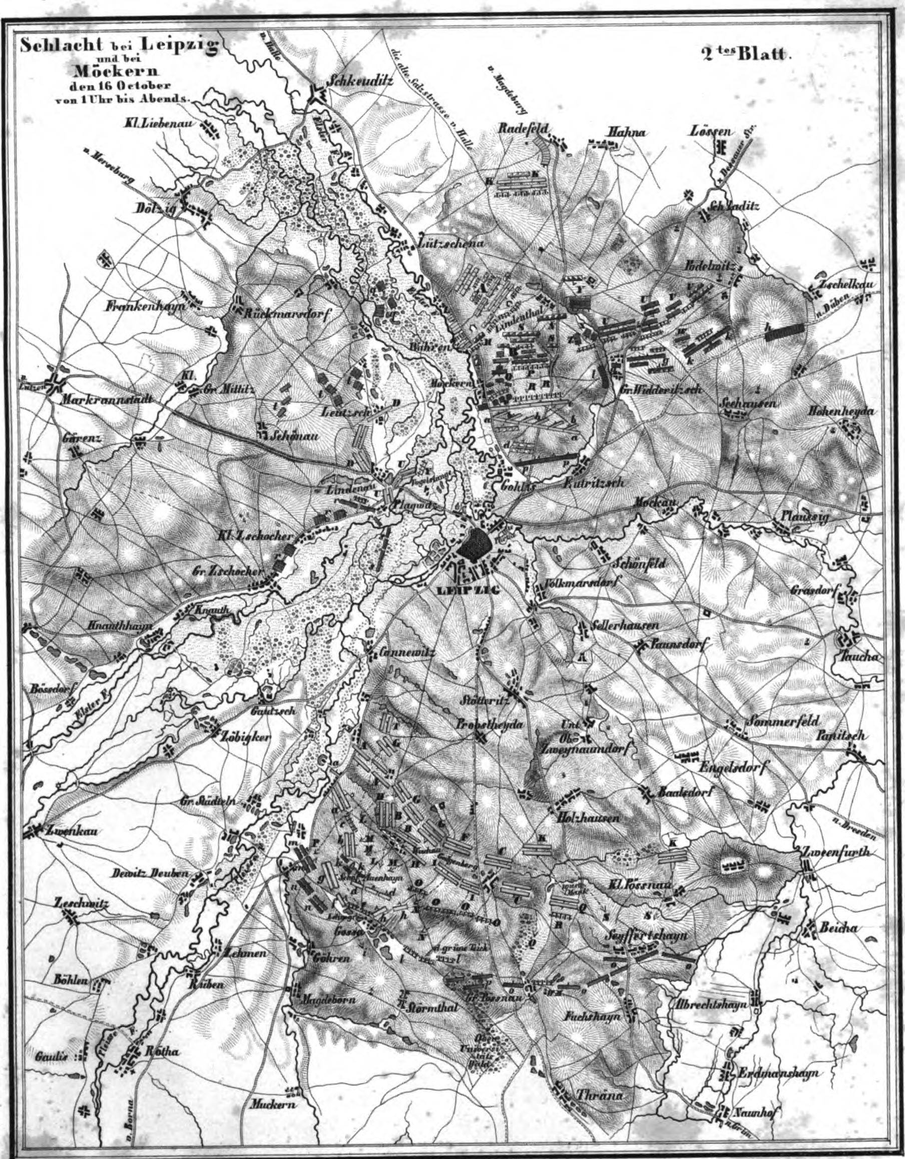 Position des troupes françaises et coalisées lors du premier jour de la bataille de Leipzig, le 16 octobre 1813, de 13h jusqu'au soir